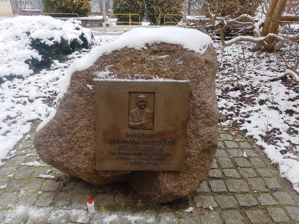 Wiesław Łasiński – kontradmirał, profesor doktor nauk medycznych. Kamień przy 7 szpitalu marynarki wojennej Gdańsk